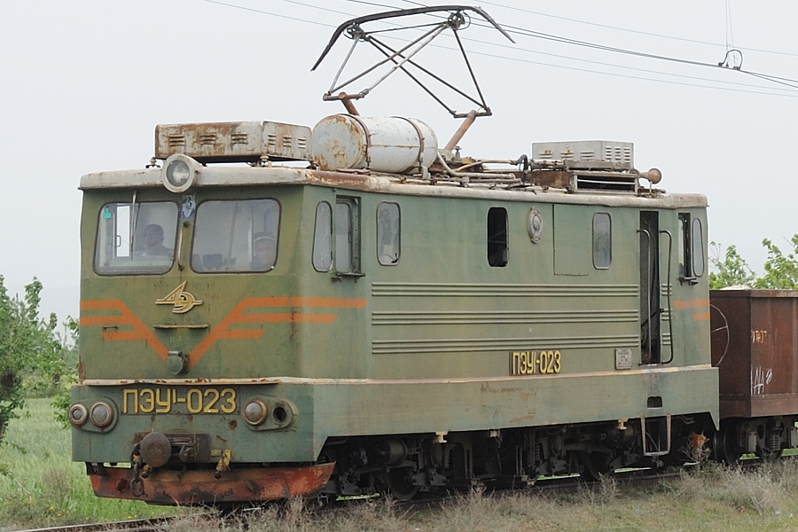 PEU1-023 in Aryk